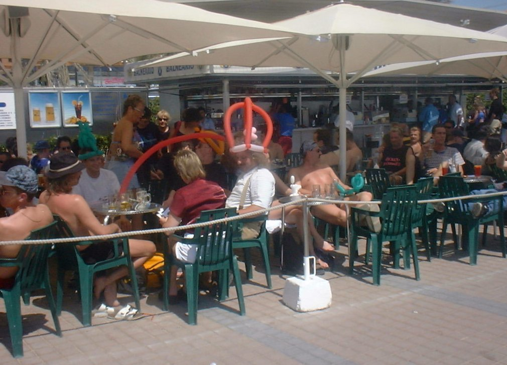 Ballermann 6/(span. Balneario Nº 6) Foto: 22. Mai 2001, Lothar Velling, Disenyador gràfic, Espanya